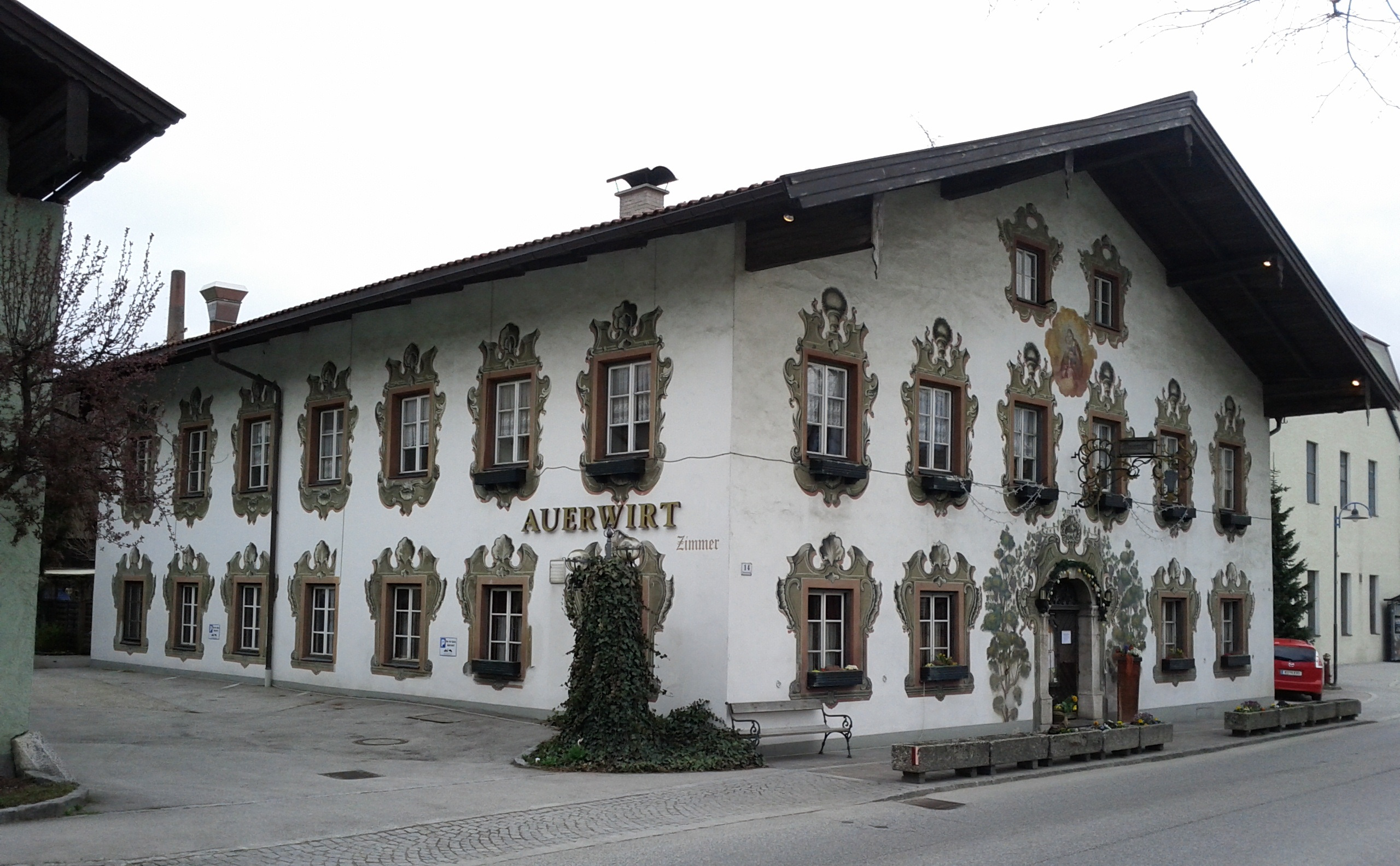 Gasthof Auerwirt - Biochemistraße 14, Kundl